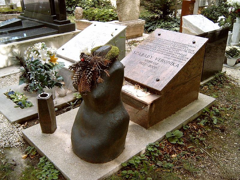 Szabady Veronika (Budapest, 1933. január 25.–Budapest, 2000. március 25.) keramikus, szobrász sírja. Budapest XII. kerület, Farkasréti temető: 1/9-1-158 [szobrász: Szabady Veronika]